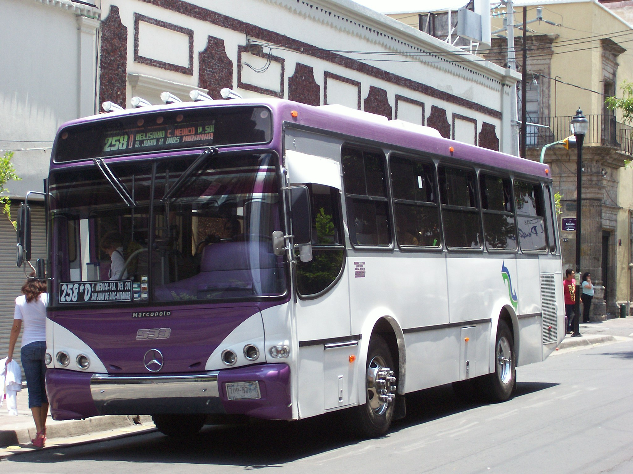 Autobus de la empresa de Transporte guadalajara, TVJ (Transporte Vanguardista de Jalisco A.C.)